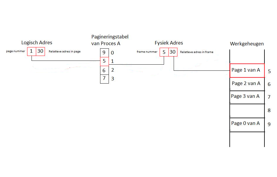 Voorbeeld van werking pagineringstabel